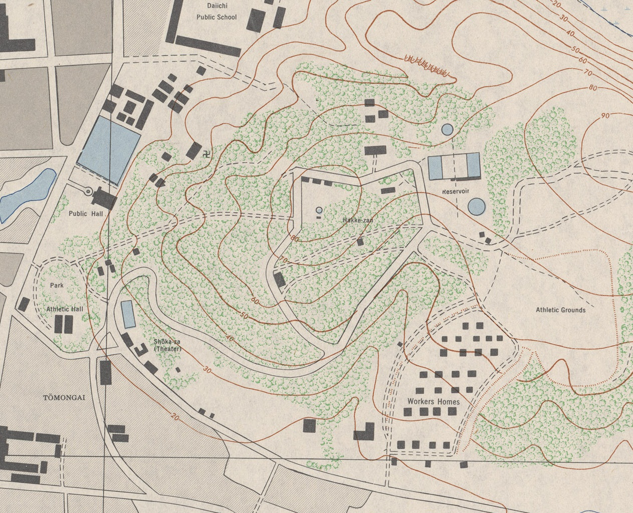 美軍地圖上的八卦山